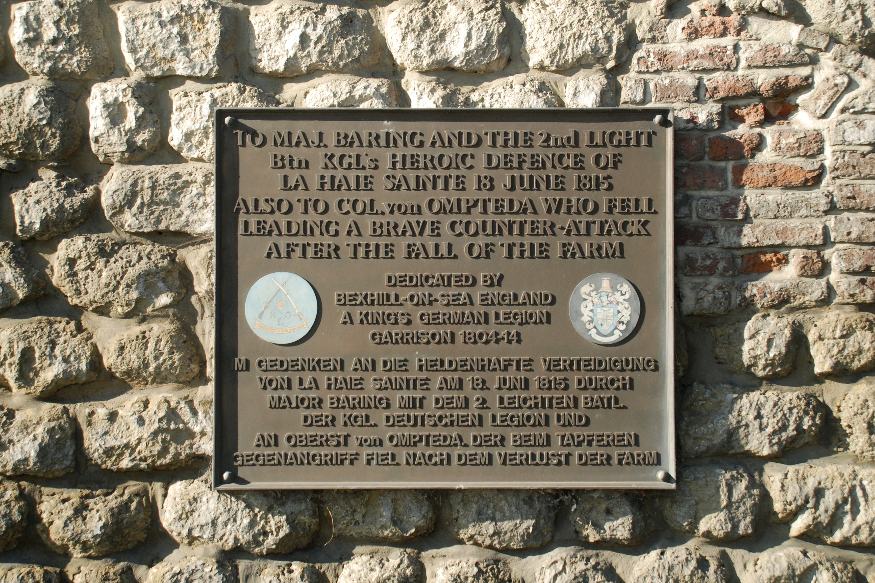 Belgique - Brabant wallon - Lasne - Plancenoit - Ferme de la Haie Sainte (bataille de Waterloo)